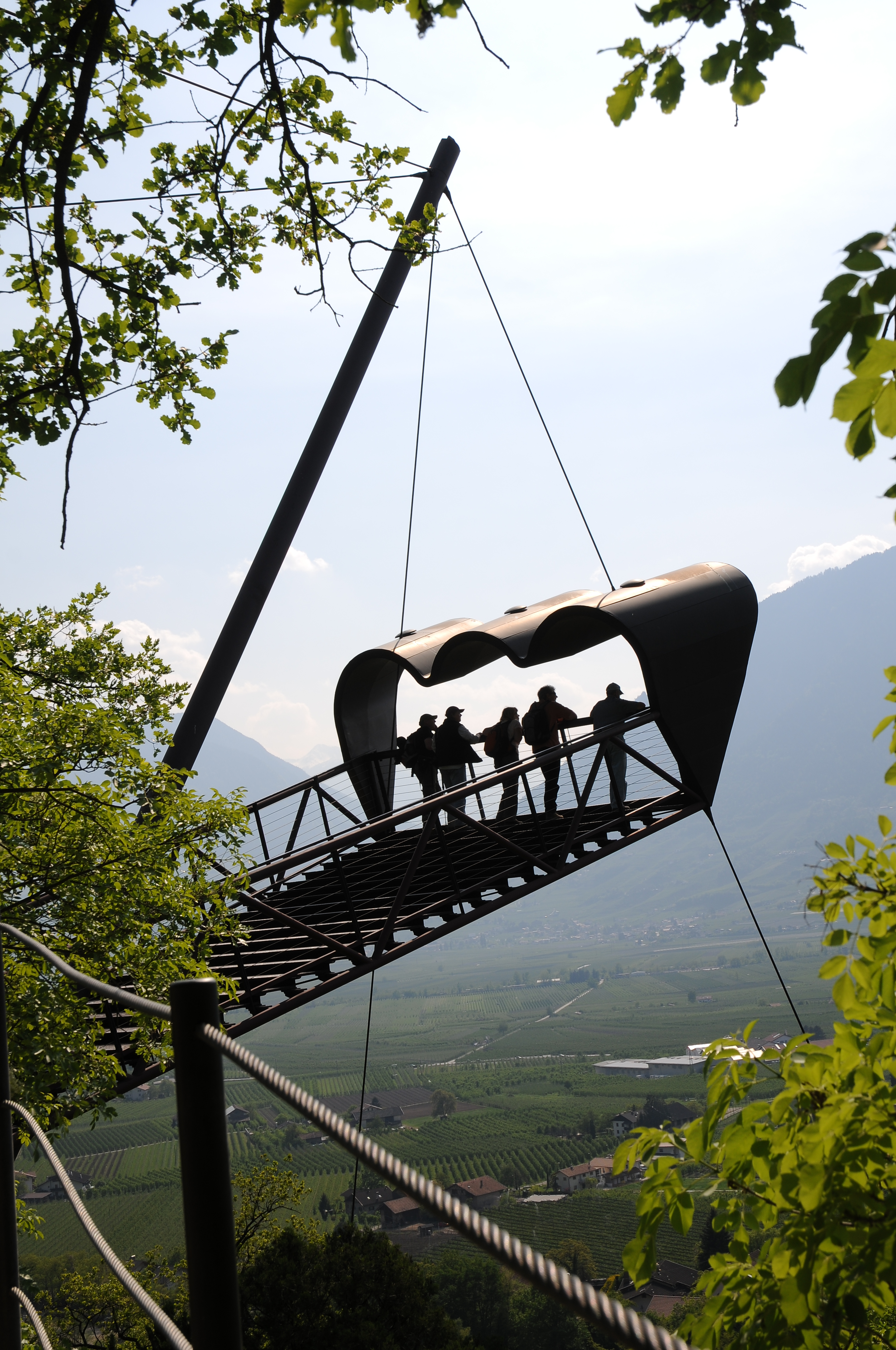 Die Gärten von Schloss Trauttmansdorff liegen am östlichen Stadtrand von Meran in Südtiro /Italien. Der nach seinem Wahrzeichen – Schloss Trauttmansdorff – benannte botanische Garten der Kurstadt Meran nimmt eine Fläche von rund zwölf Hektar ein. Im Bild die, von Matteo Thun entworfene Aussichtsplattform, auch bekannt unter dem "Metteo Thunsche Gucker". Von dort überblickt man Meran und die Umgebung des Etschtales.